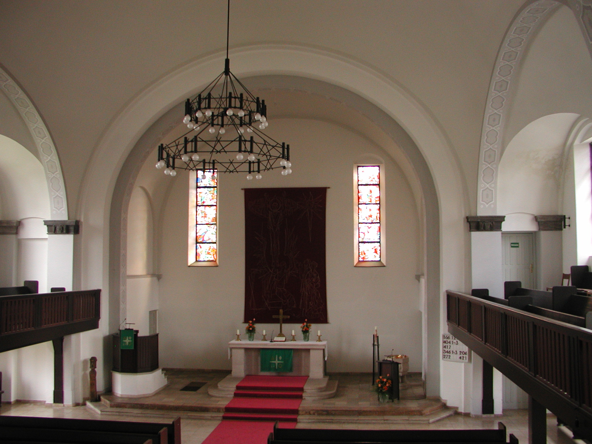 Das Innere der Kirche "Zur frohen Botschaft"